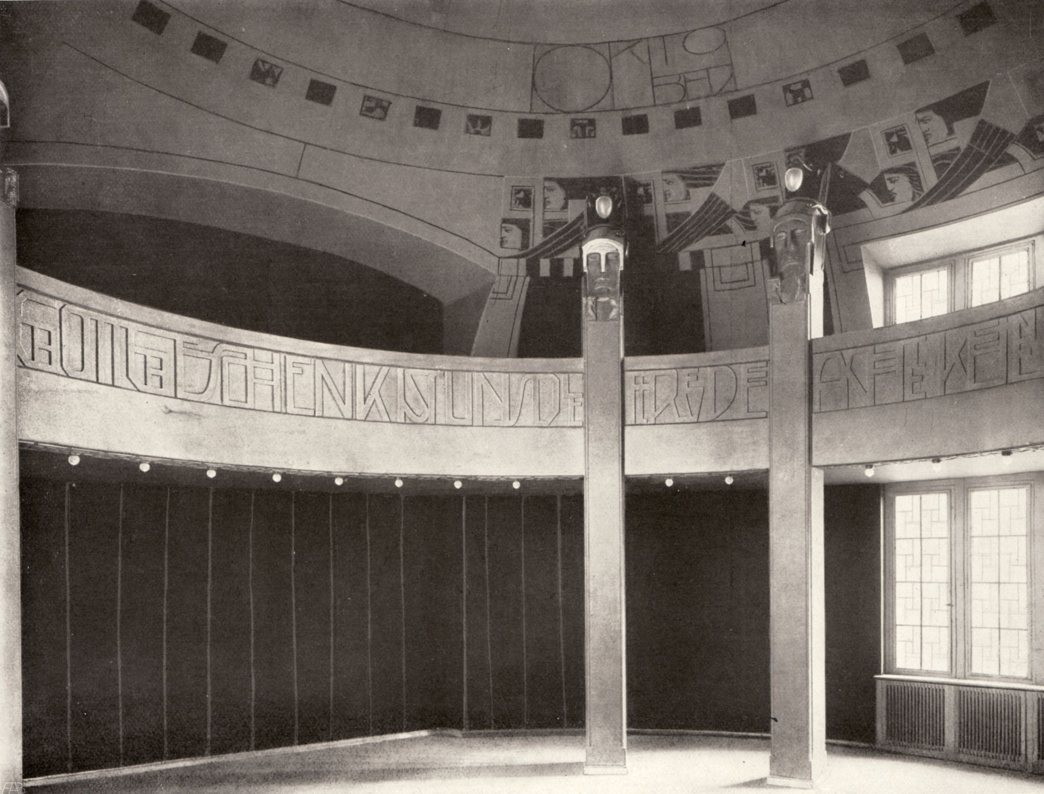 Berlin - Weinhaus Rheingold, Ansicht des Blauen Kuppelsaals